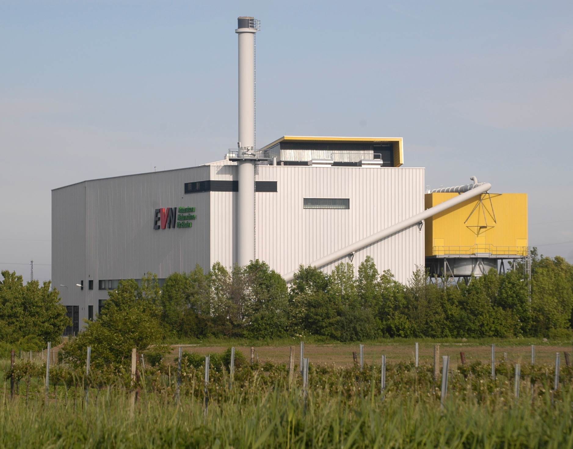 Aussenansicht des Biomasseheizkraftwerkes Baden, welches das Fernwärmenetz in Baden versorgt